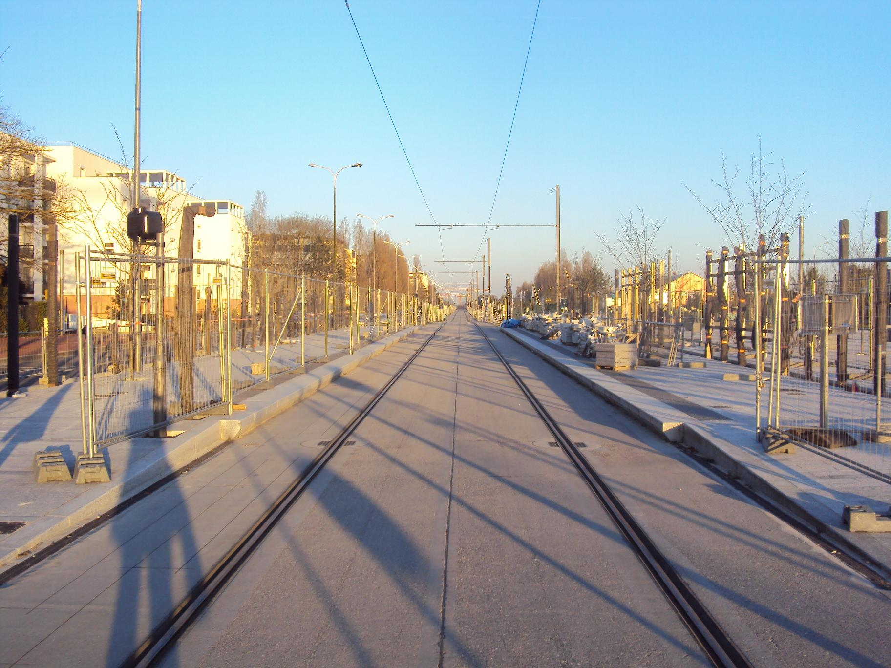 Travaux du T6 Vélizy